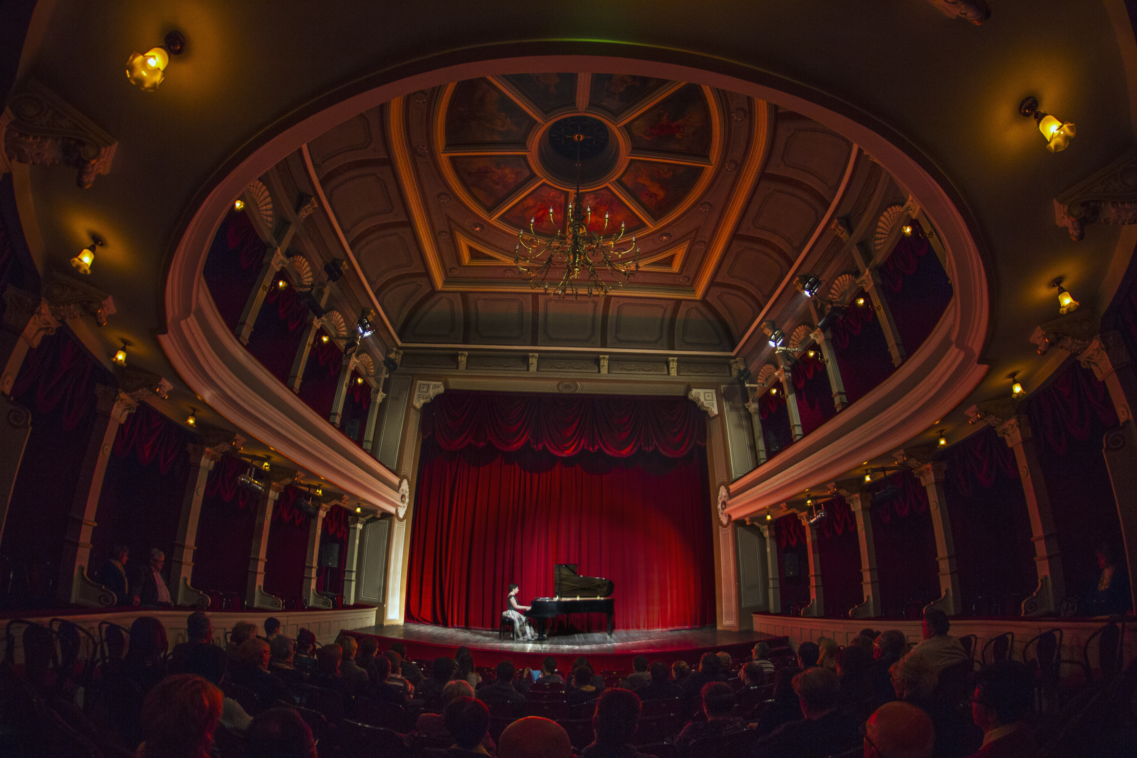 Narodno pozoriste Sombor